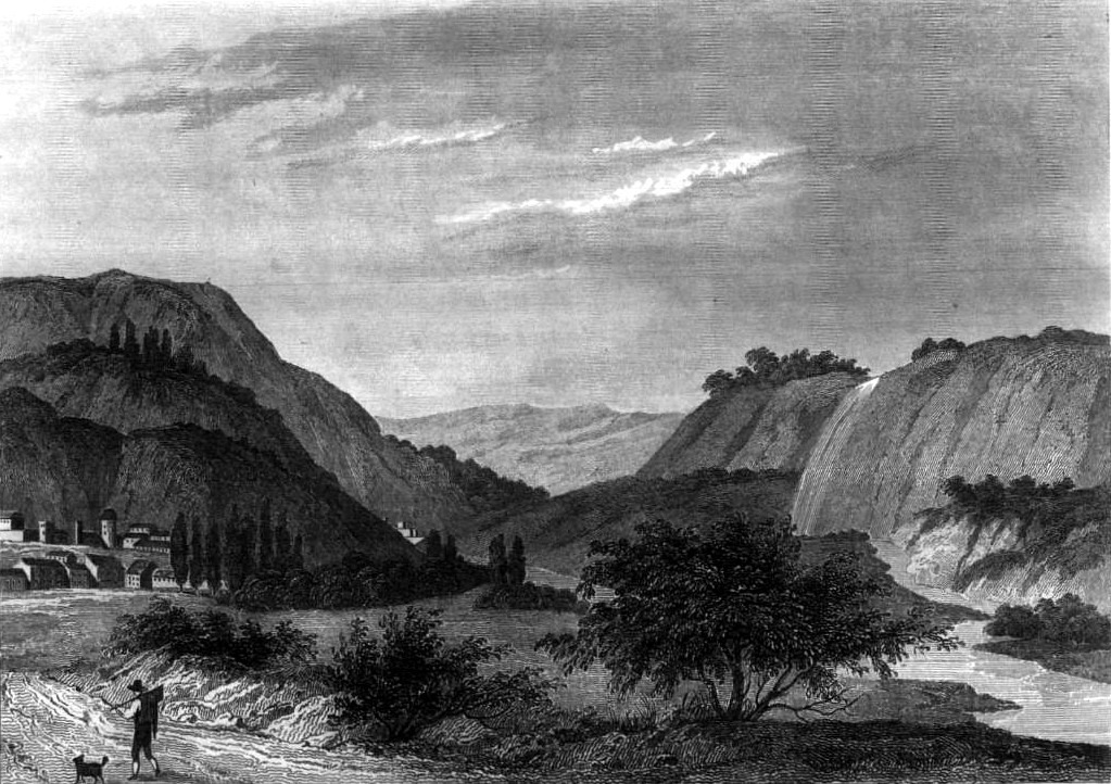 Image en provenance du livre : Eusèbe Girault de Saint-Fargeau, Guide pittoresque du voyageur en France, contenant la statistique et la description complète des quatre-vingt-six départements, orné de 740 vignettes et portraits gravés sur acier, de quatre-vingt-six cartes de départements et d'une grande carte routière de la France, par une Société de gens de lettres, de géographes et d'artistes, Paris, F. Didot frères, 1838, 6 volumes in-8° (BNF : 8-L25- 46). Volume III Didot frères, 1838. Route de Paris à Nice traversant les départements de l'Isère, des Hautes-Alpes, des Basses-Alpes et du Var. auteurs dessins : Rauch (ou autre) auteurs gravures : Skelton fils, Schroeder, Bishop (ou autre)